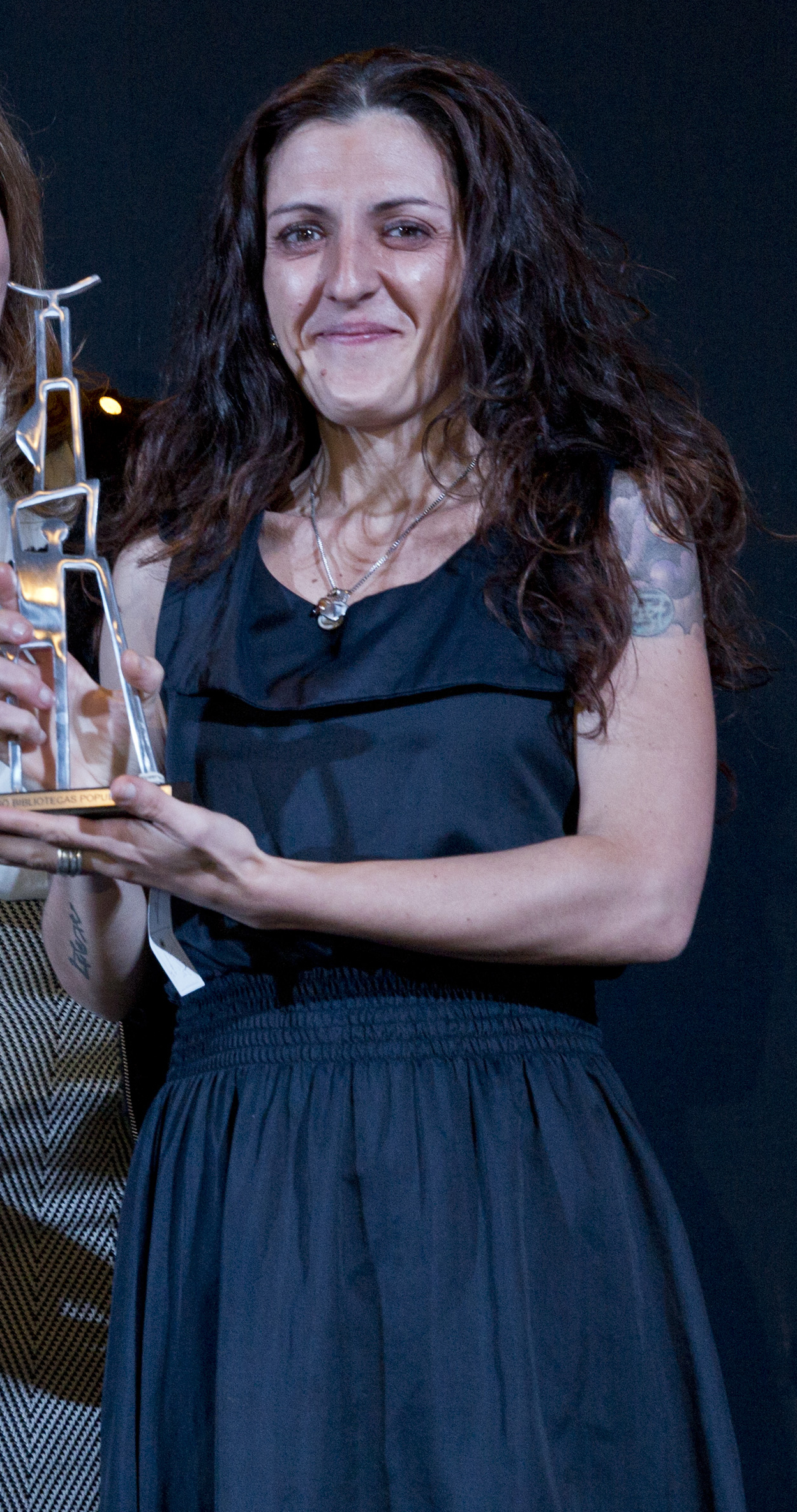 Lola Berthet, actriz argentina